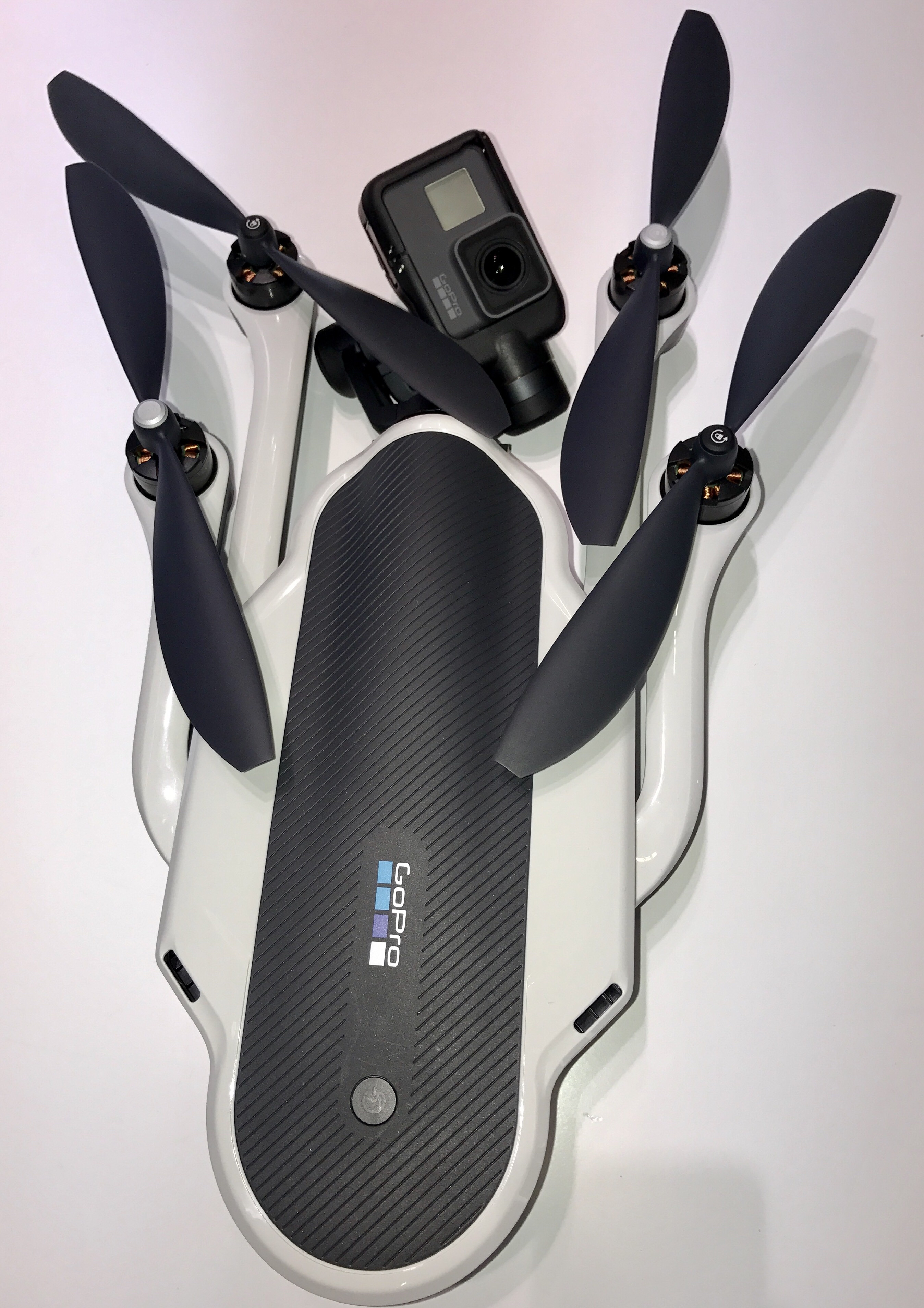 Gopro 5 Karma drone